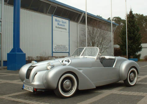 Burton Kitcar auf Entenbasis